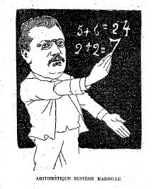 Caricature de Mr Désiré Maroille publiée dans "Nouveau Bilan Rouge" le petit belge. vers 1895. page 17